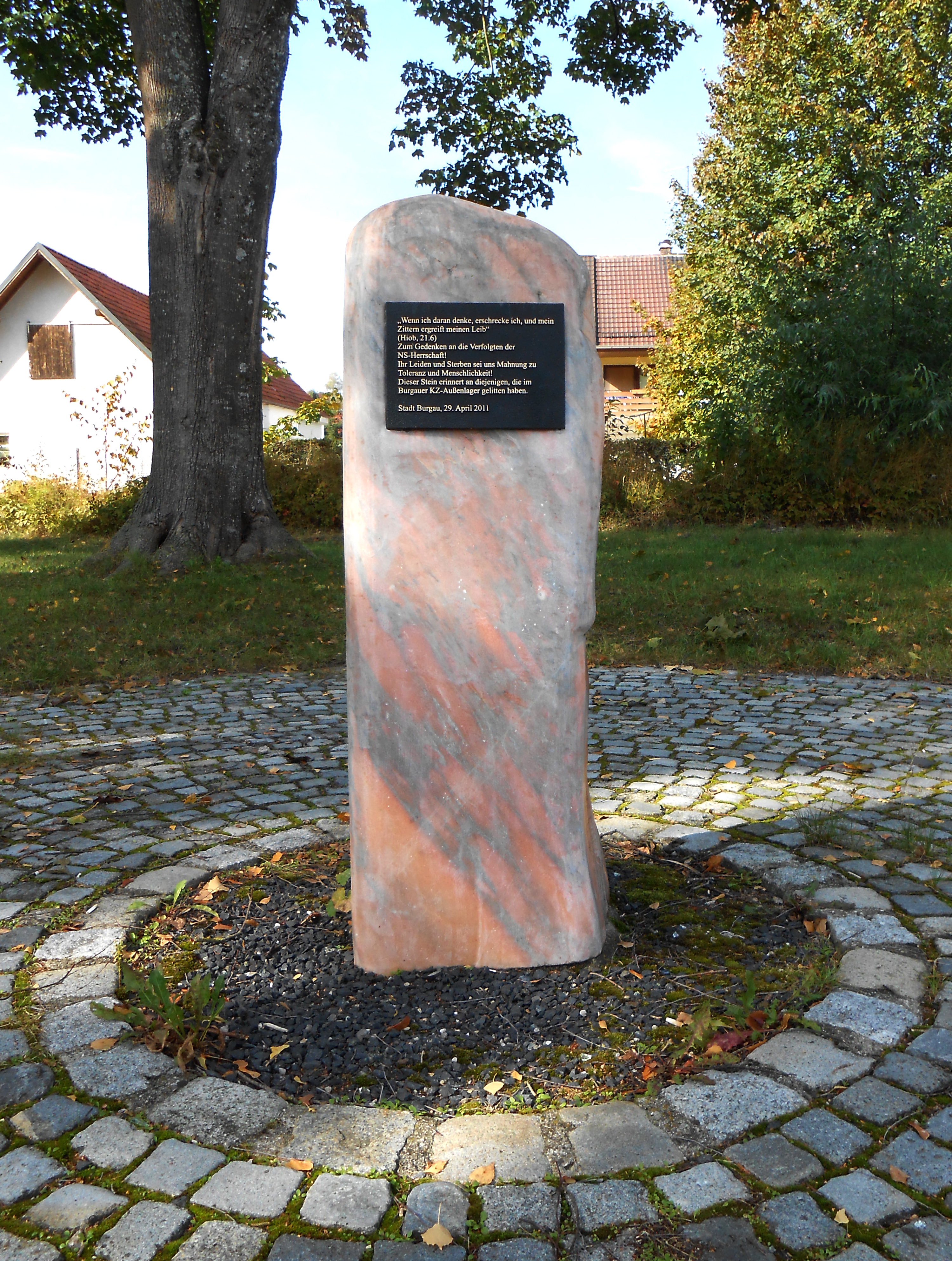 Denkmal an das sich in der Nähe befundene Konzentrationslager Burgau